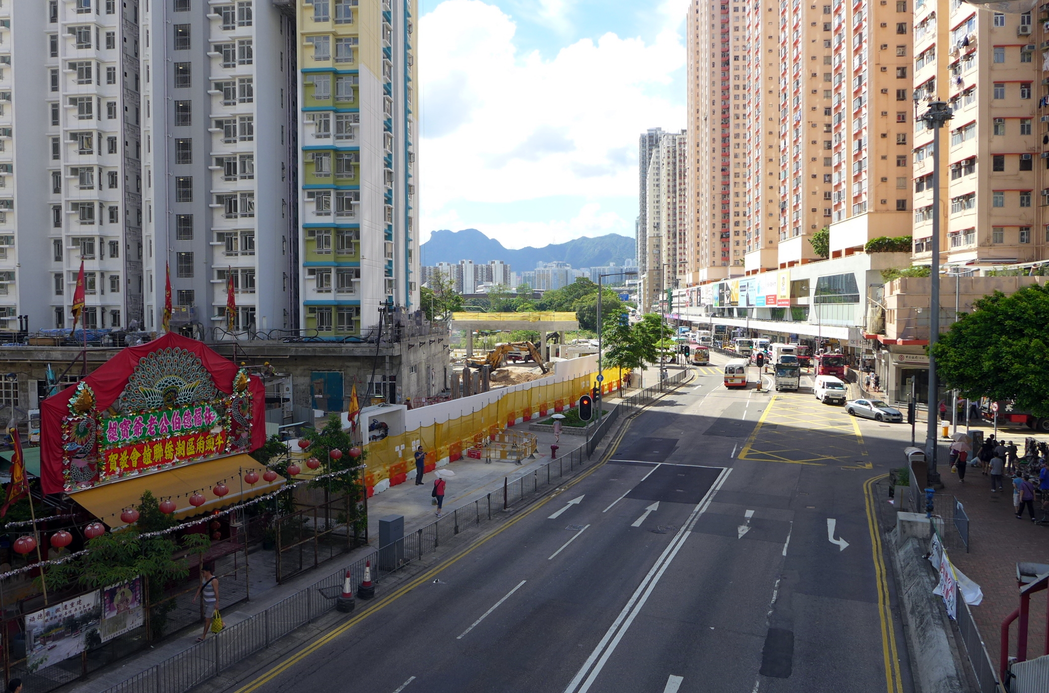 Ngau Tau Kok Road